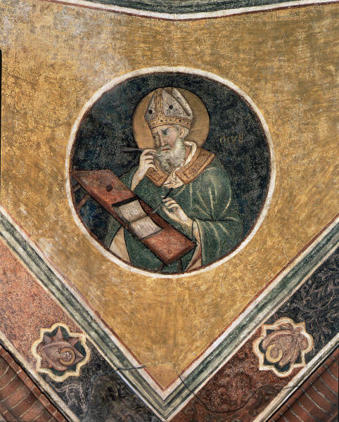 St Augustinus